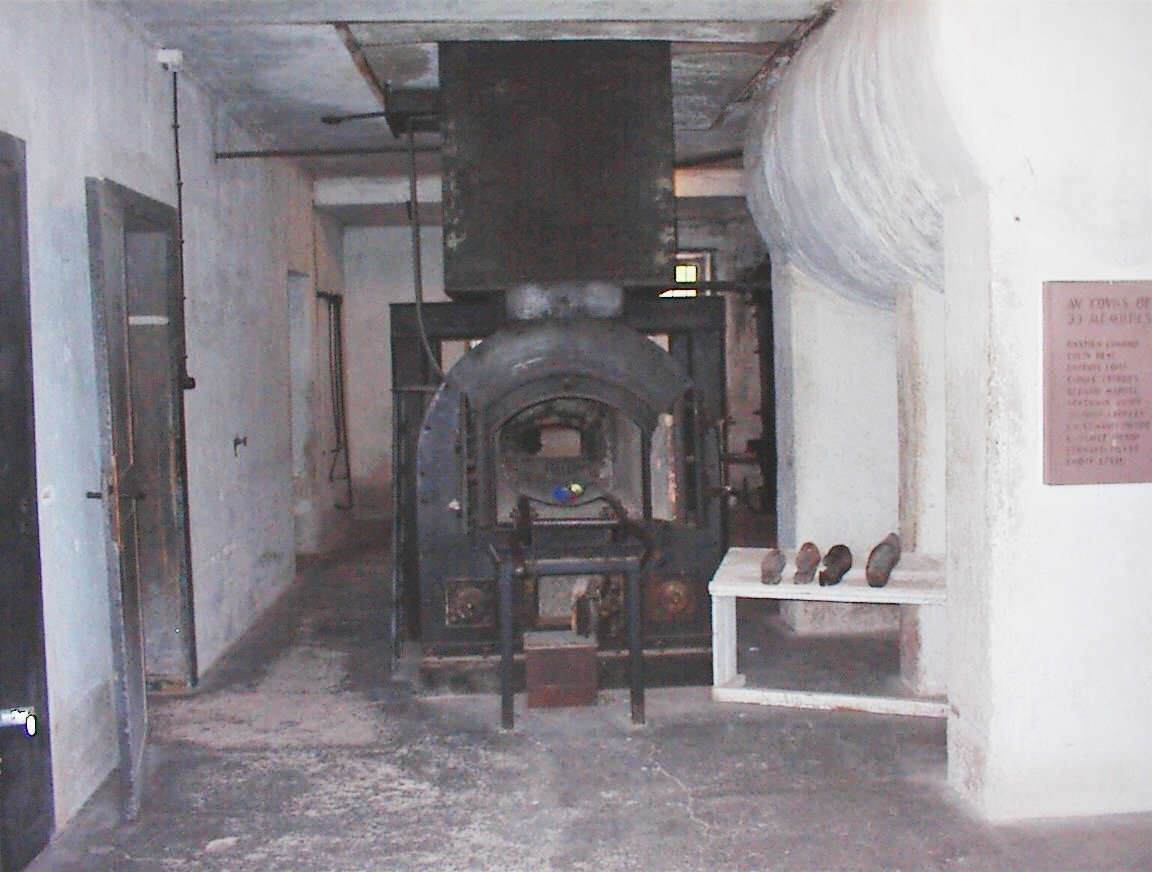 Four crématoire à Natzweiler-Struthof camp